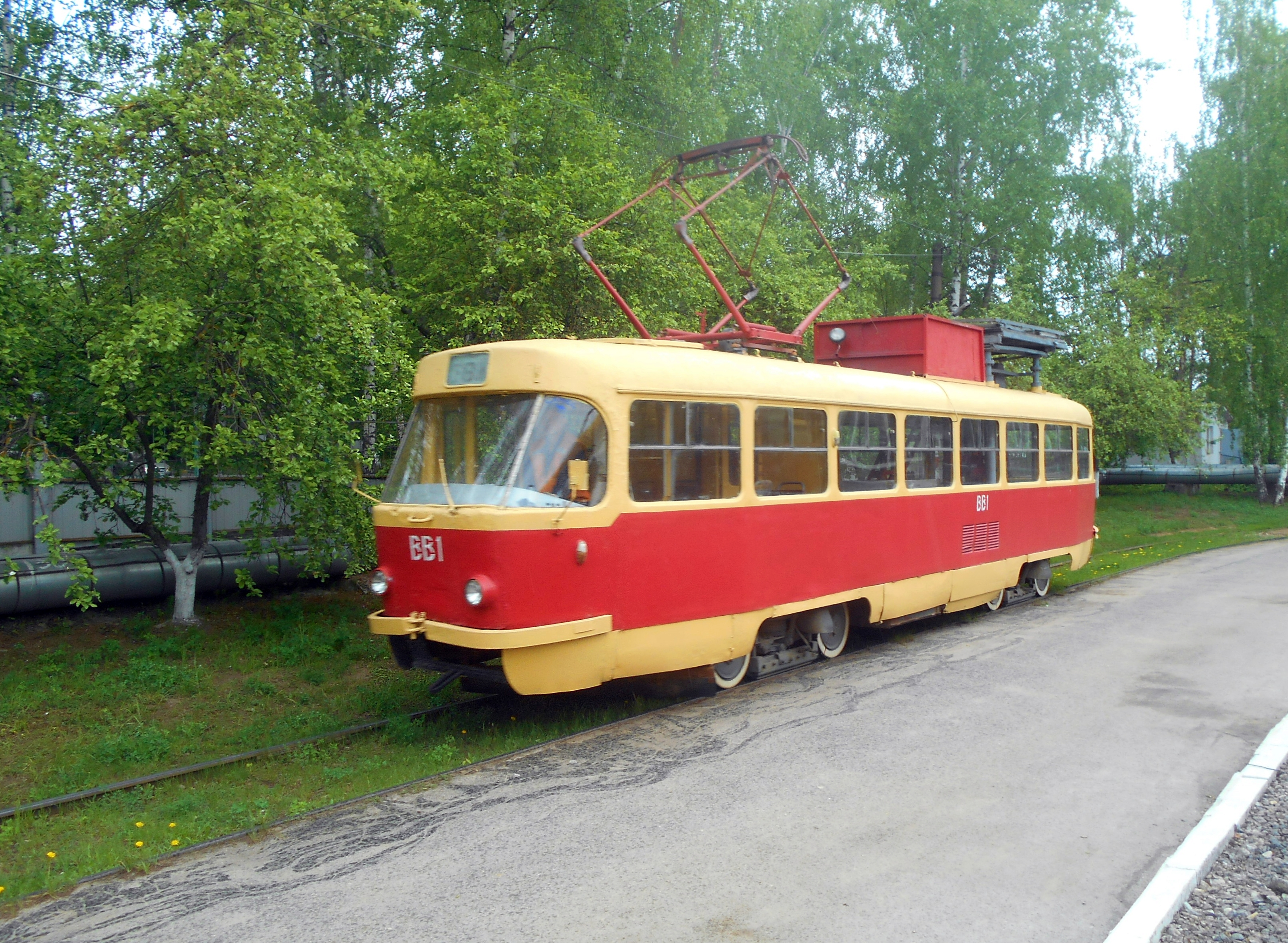 Трамвай Tatra Т3 переоборудованный в вагон-вышку ВВ-1 в трамвайном депо № 1 в Нижнем Новгороде